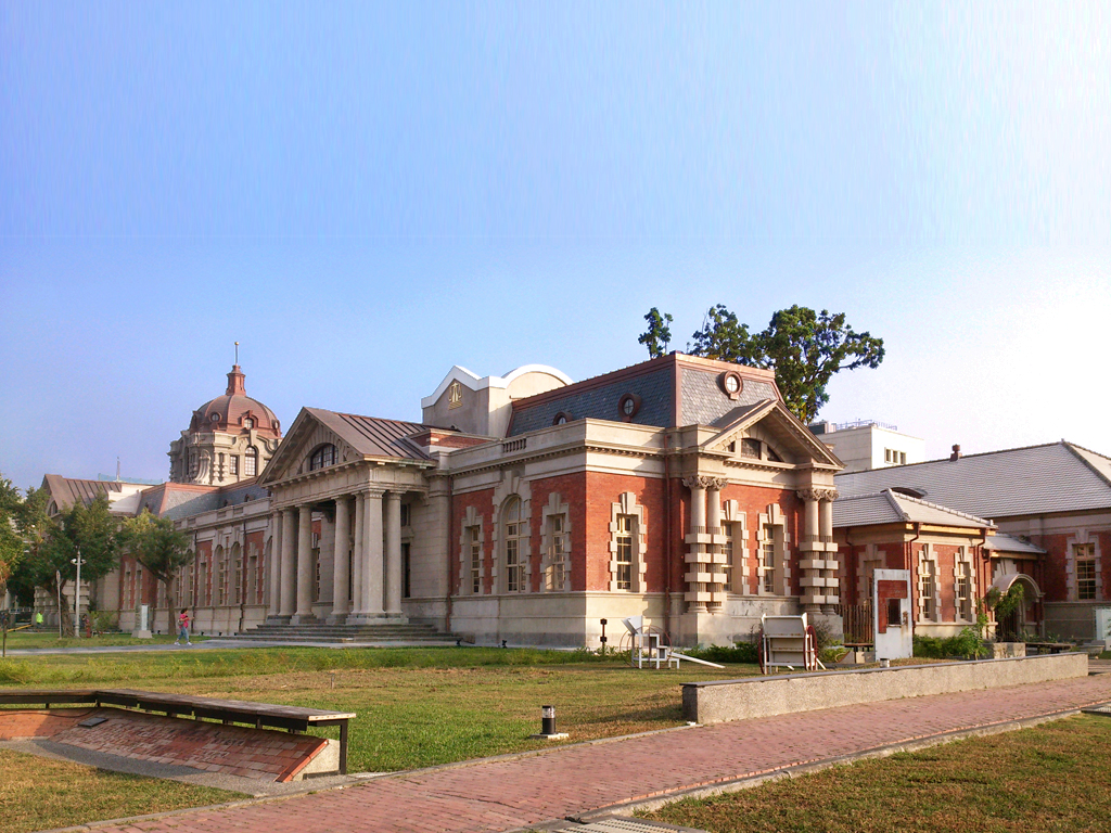 原臺南地方法院今貌